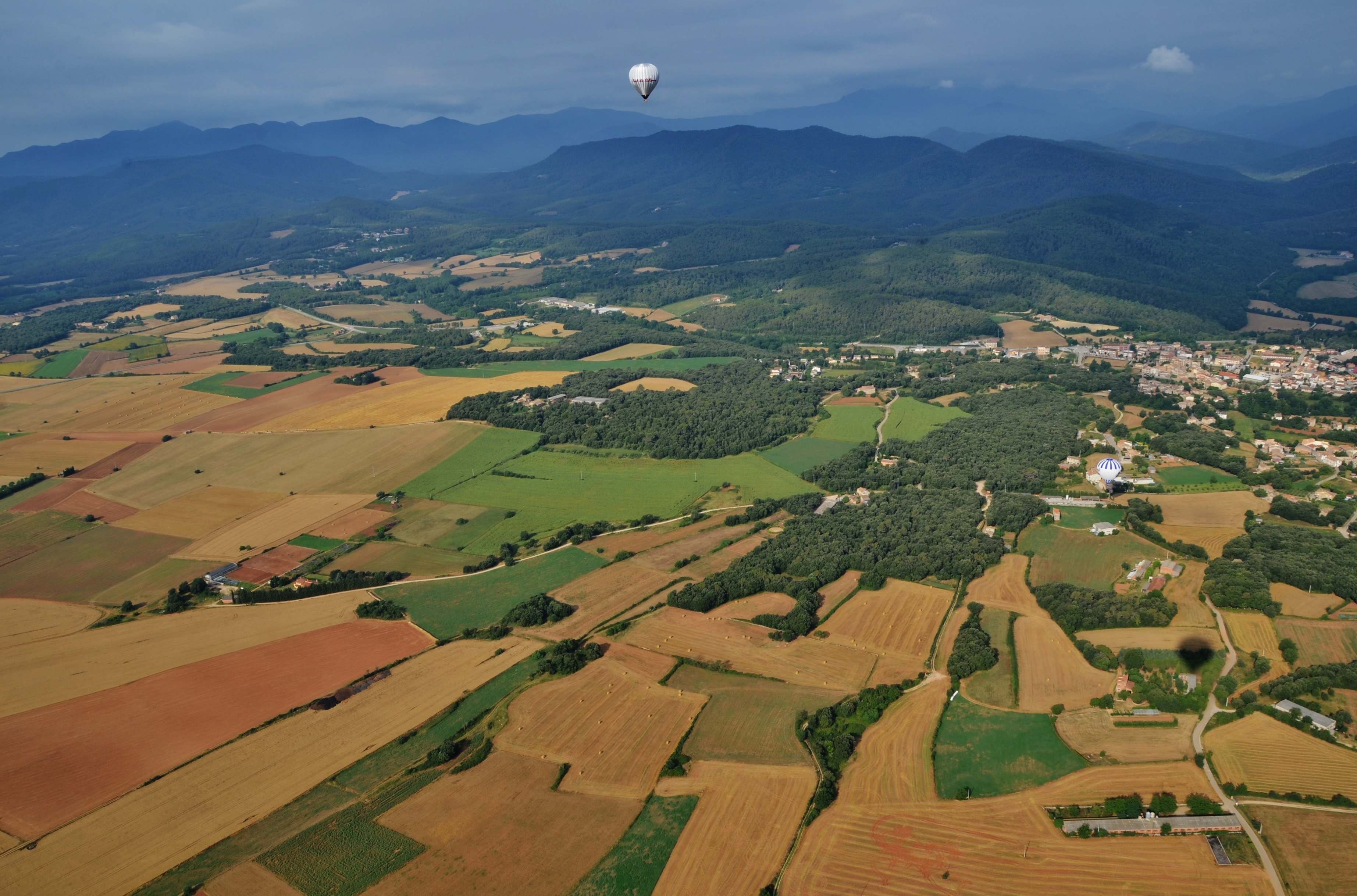 Zona volcÃ nica de la Garrotxa This is a a photo of a natural area in Catalonia, Spain, with id: ES510218